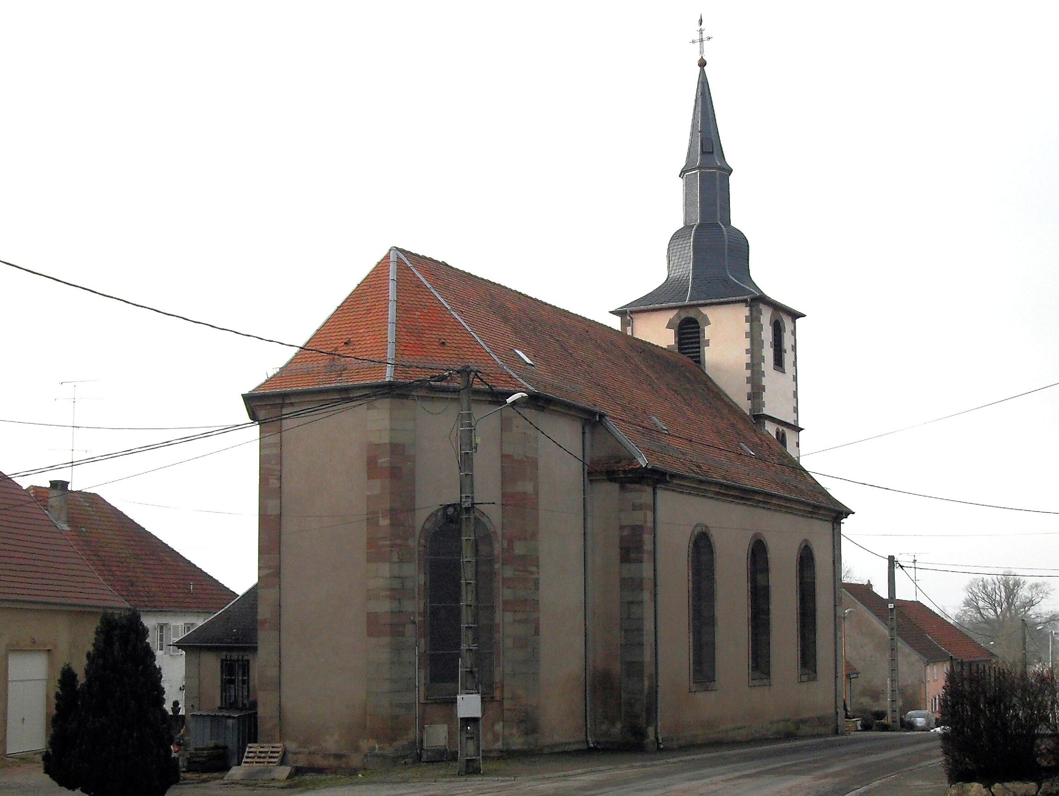 L'église Saint-Denis à Hérange, côté à l'est